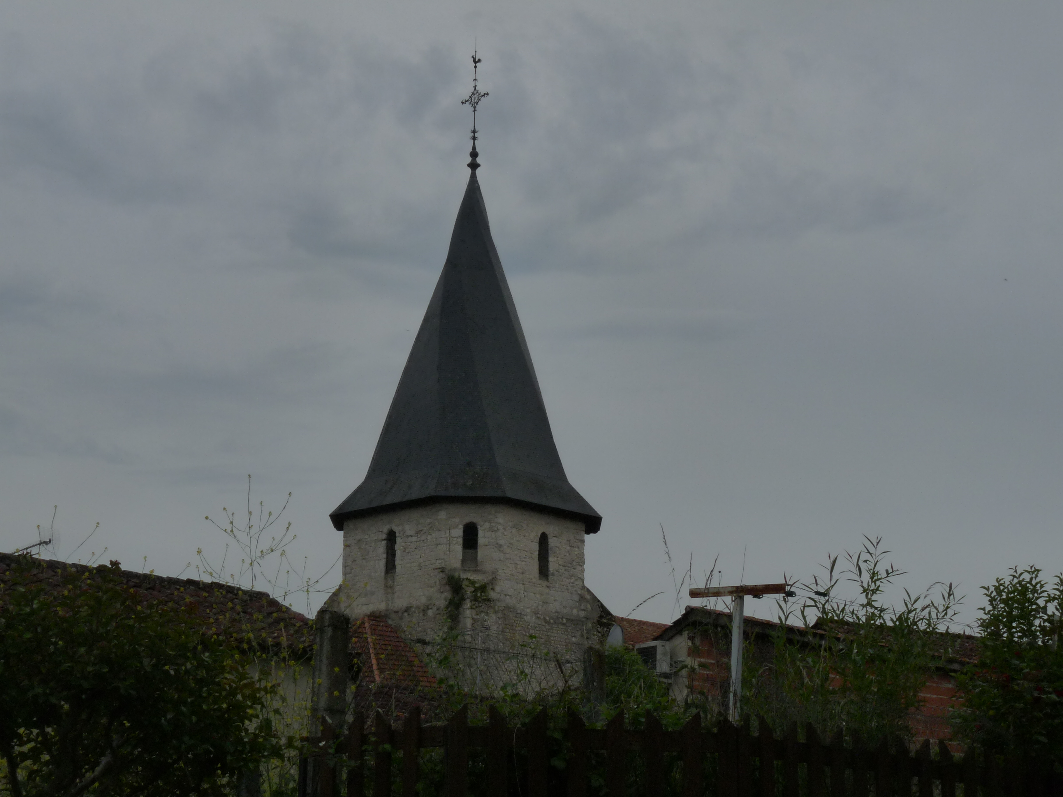 Clocher de l'église Notre-Dame de Sérignac-sur-Garonne